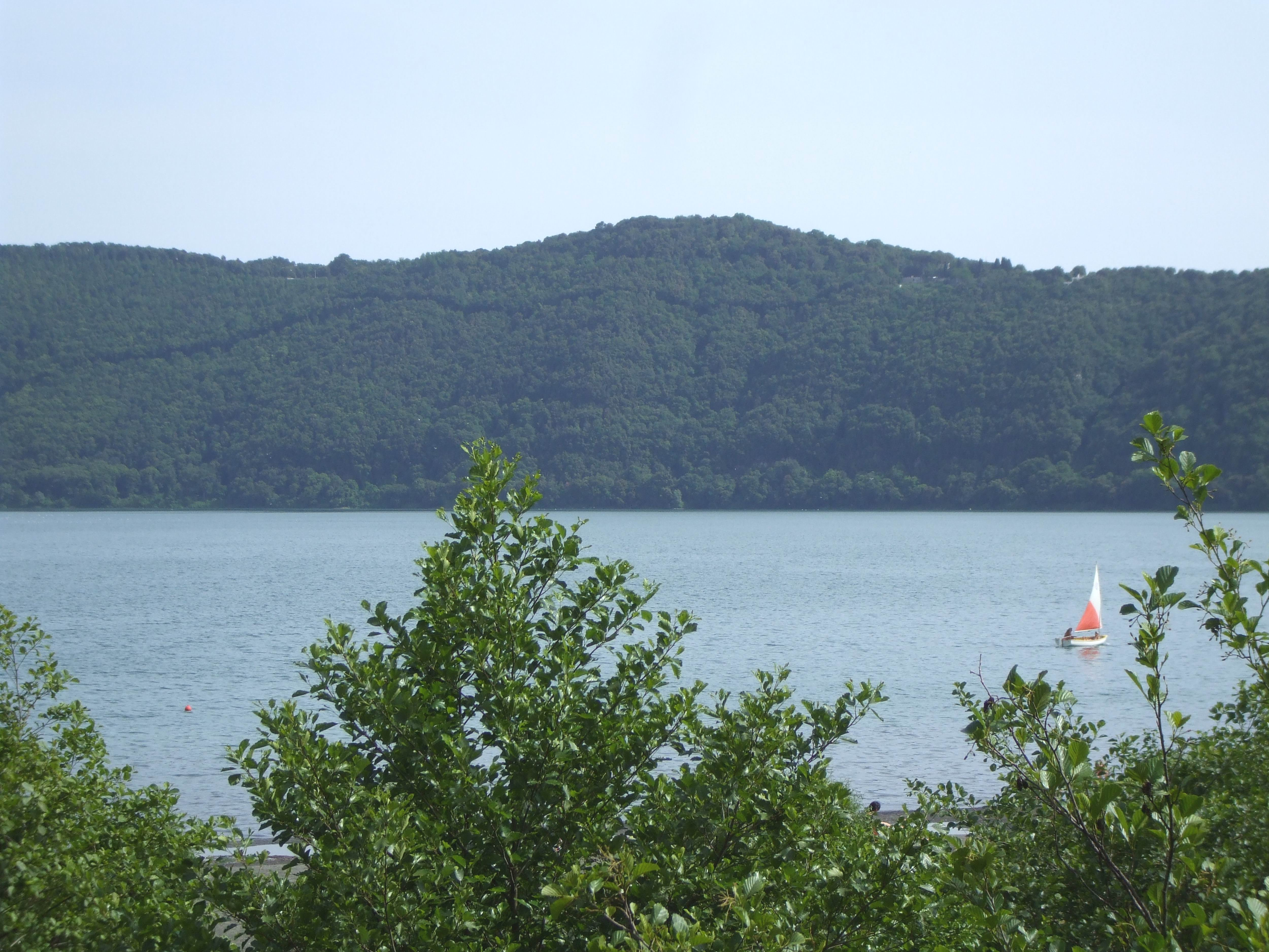 Lago Albano - panorama della sponda albanense